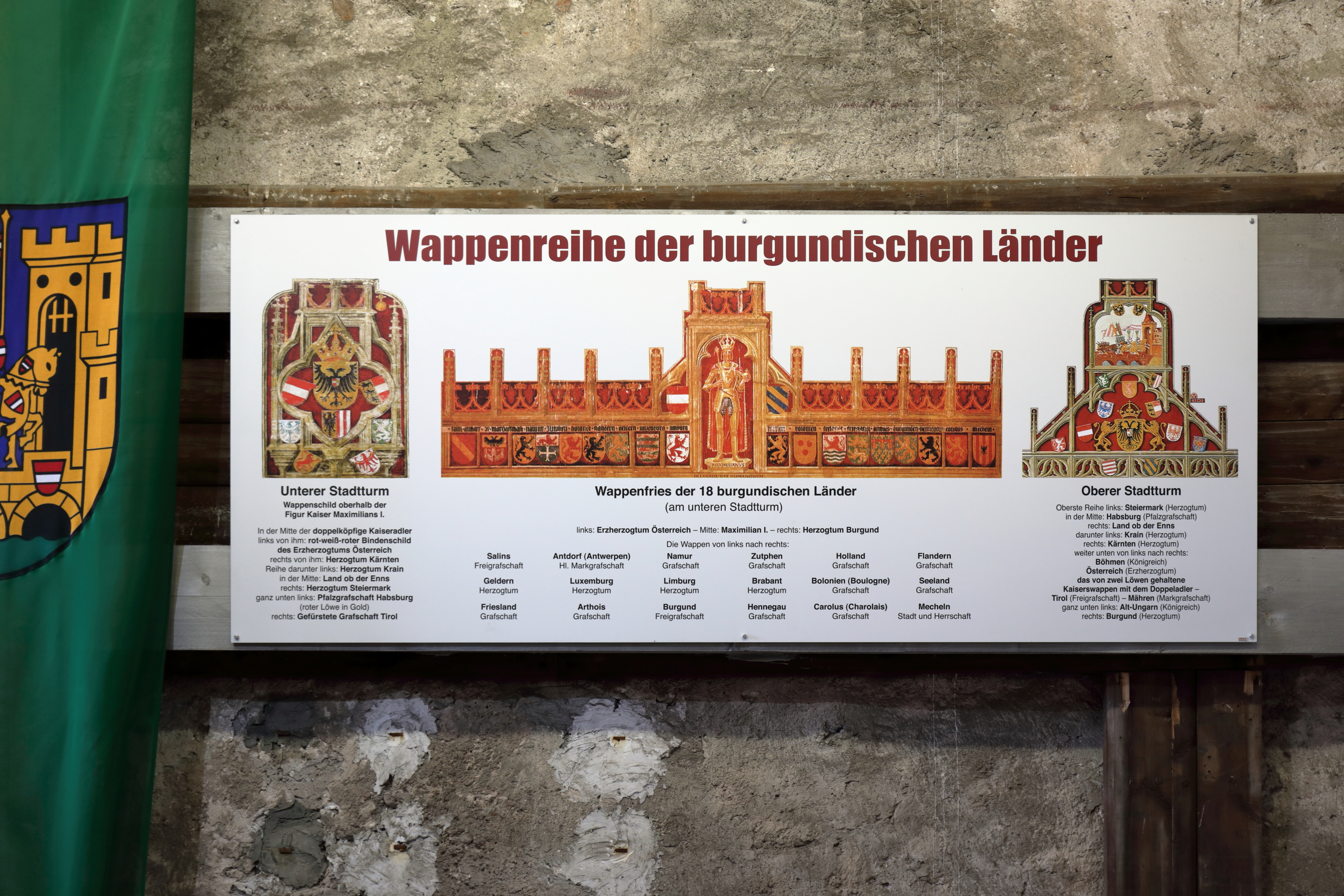 Beschreibung der Fresken des unteren und oberen Stadtturmes der oberösterreichischen Stadt Vöcklabruck. Die Tafel ist ein Teil des kleinen Museum, das sich im unteren Stadtturm befindet.